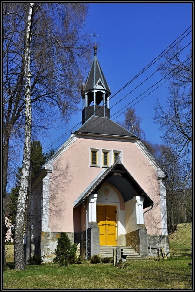 Kostel Nejsvětějšího srdce Ježíšova na Suché u Jáchymova